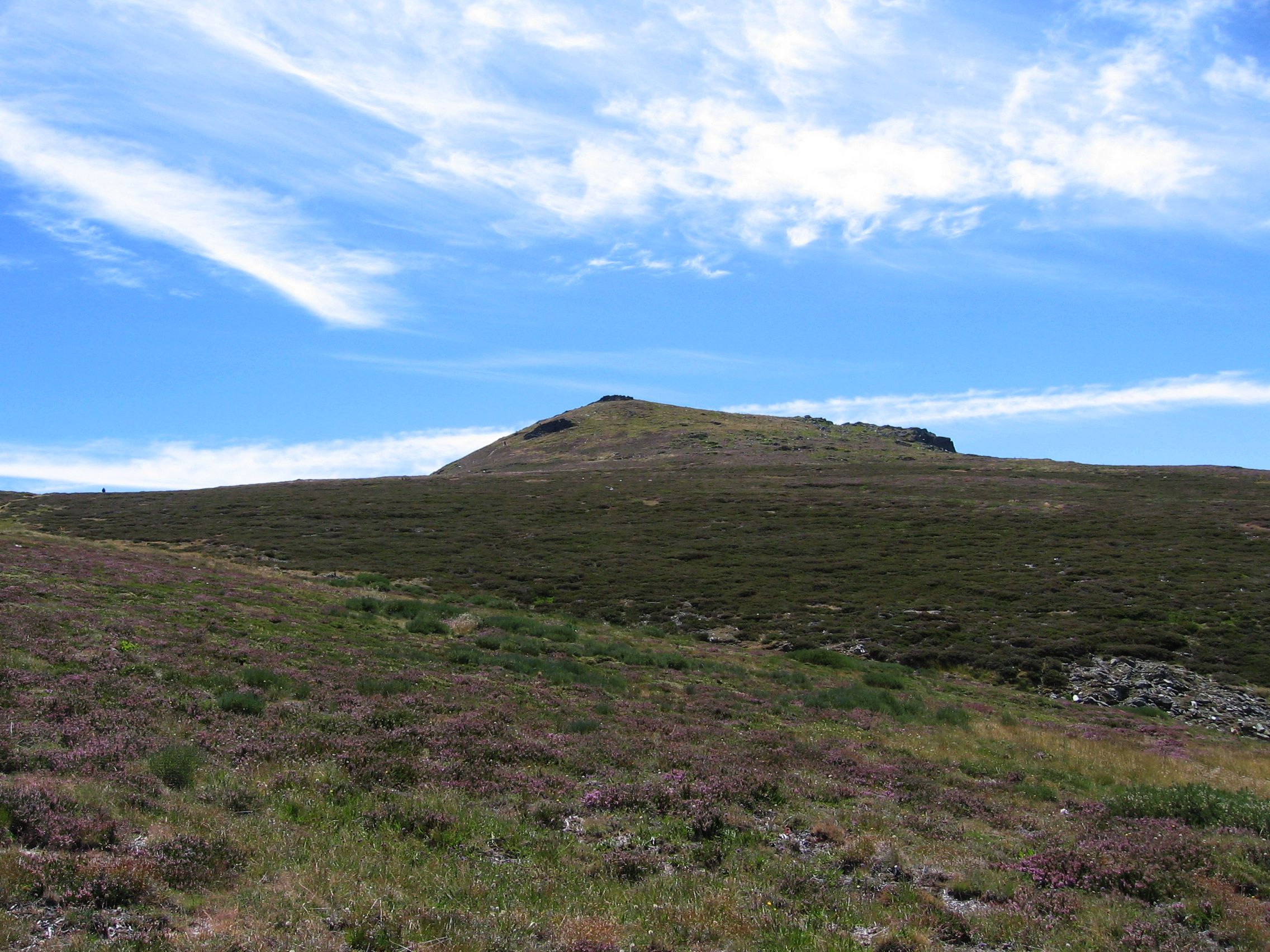 Peña Trevinca, Espana.